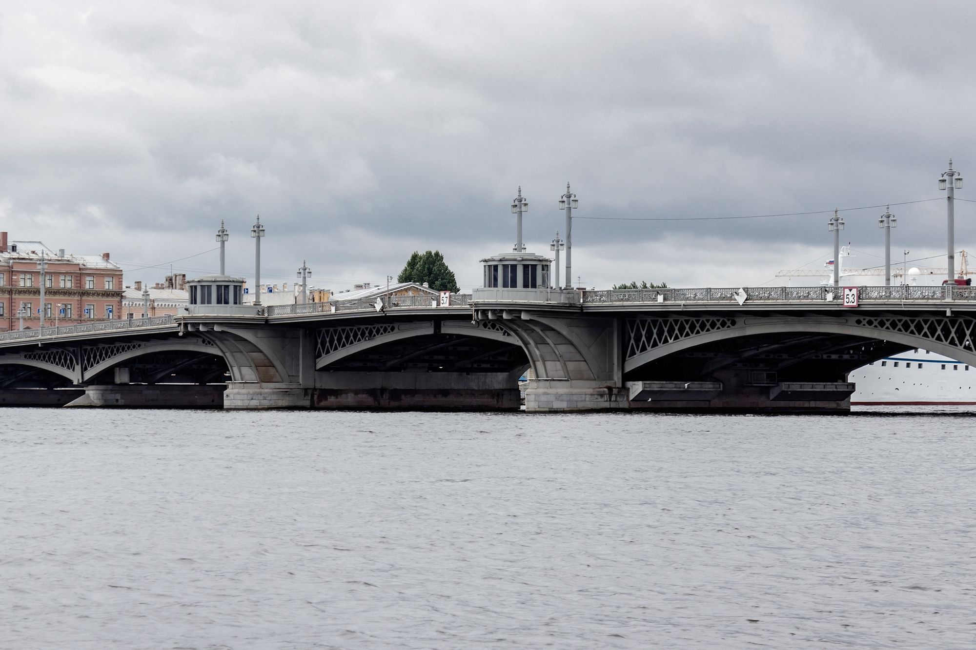 Ограждение, фонари и павильоны Благовещенского моста: через р. Неву, соединяет площадь Труда и Васильевский остров, Адмиралтейский район, Санкт-Петербург